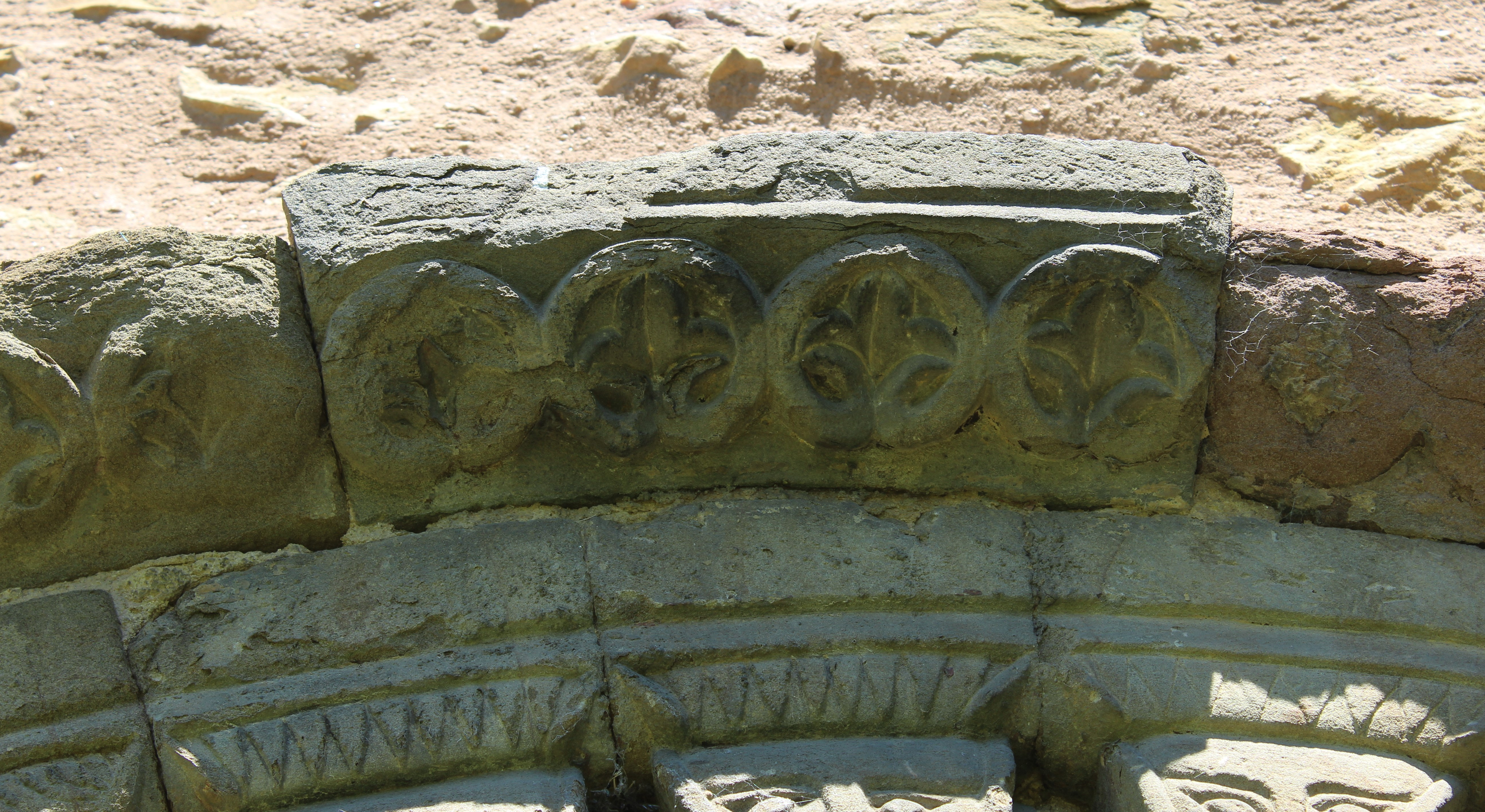 Detalle de las piezas con forma de flor lis rodeadas por un círculo en el guardapolvos.